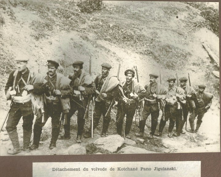 IMRO cheta ot Pano Zhigyanski